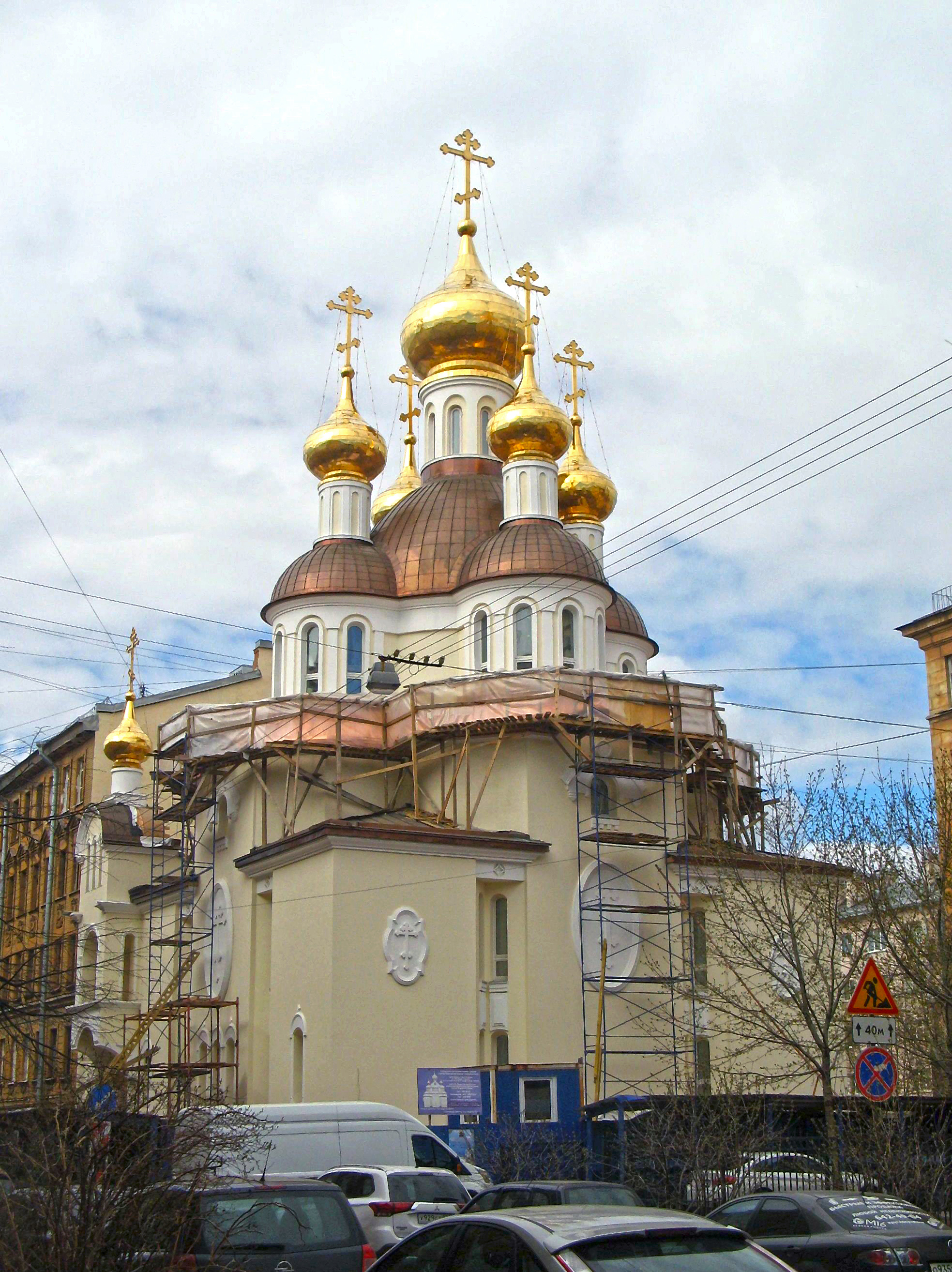 Церковь Ксении Петербургской на Лахтинской улице, Санкт-Петербург